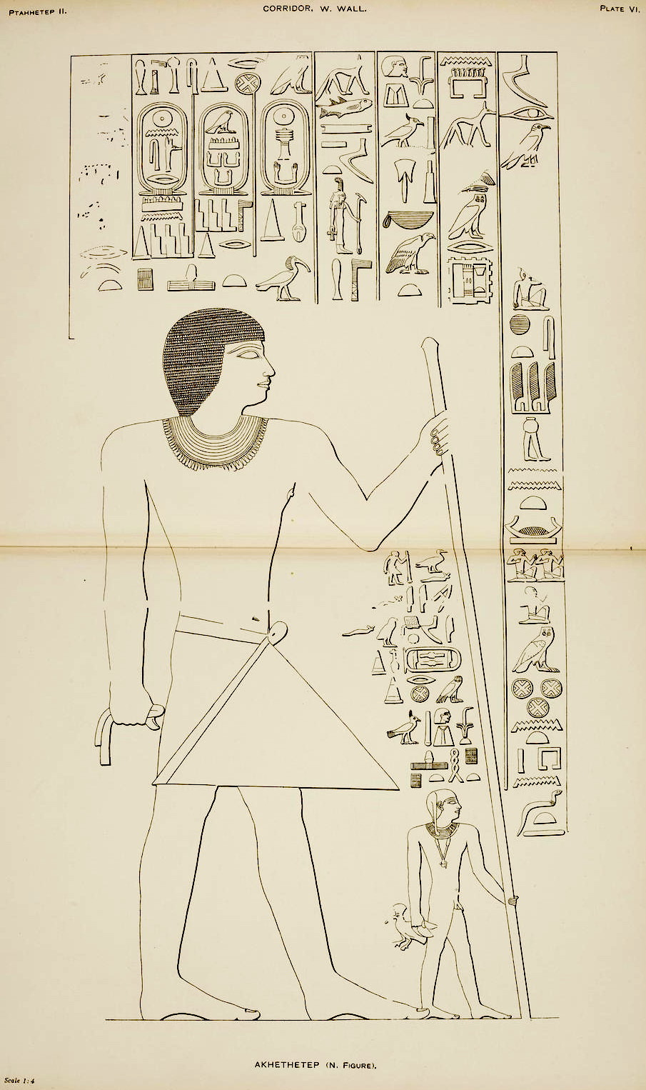 Zeichnung von Achethotep aus der Doppelmastaba Ptahhotep in Sakkara